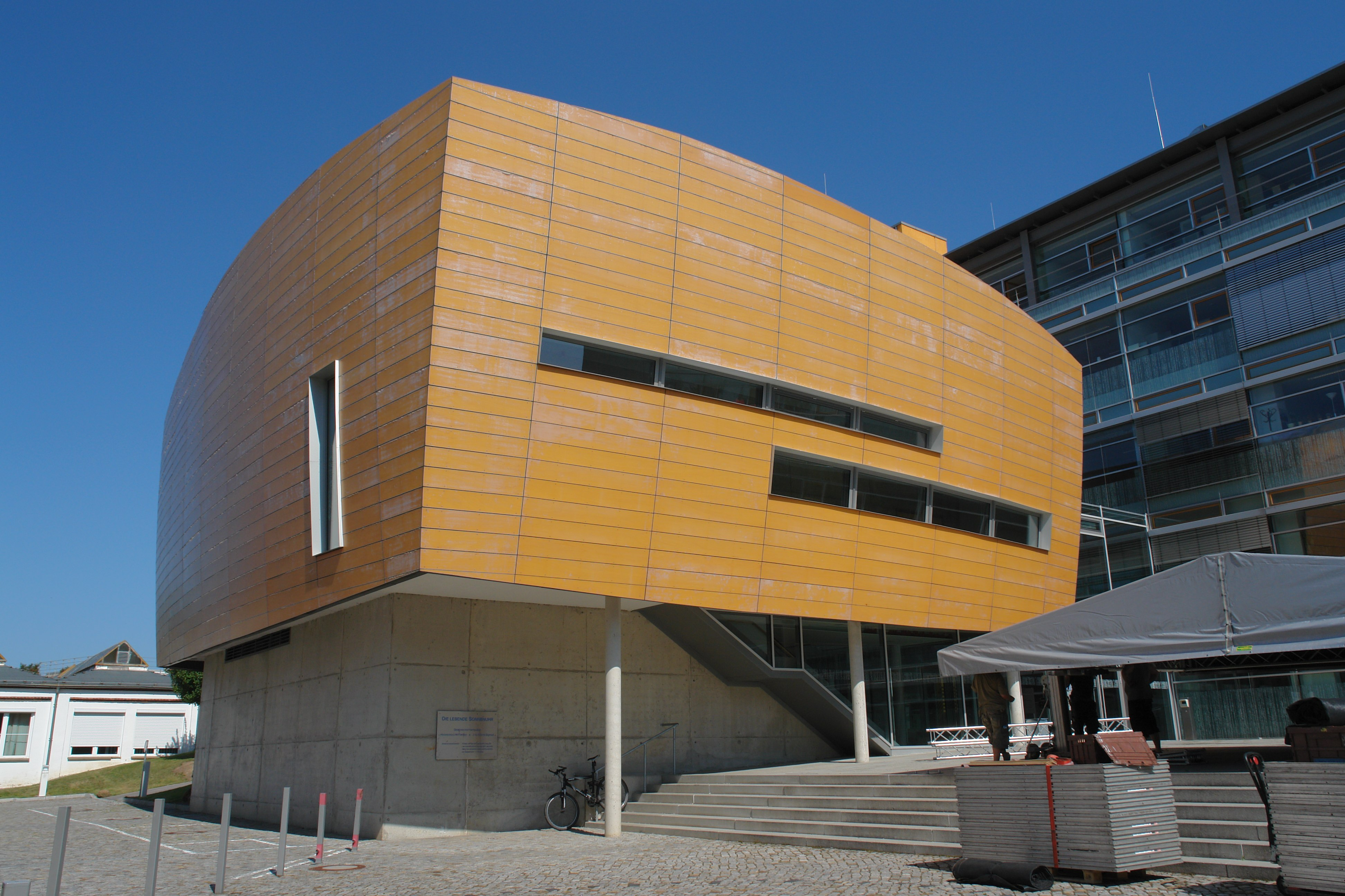 Hochschule für Technik und Wirtschaft Mittweida Grunert-de-Jácome-Bau